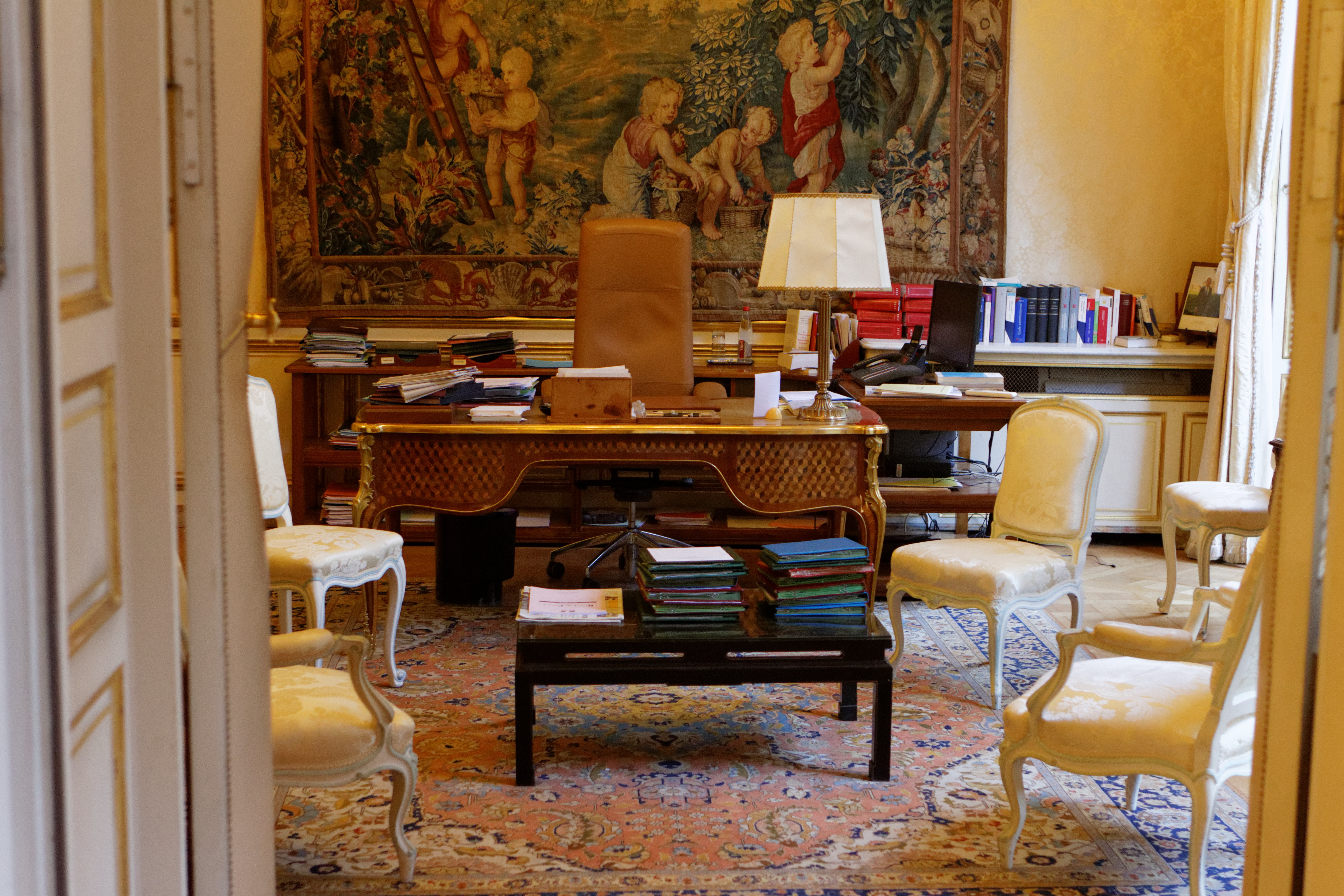 Hôtel Matignon lors des journées du patrimoine. Bureau du secrétaire général du gouvernement.